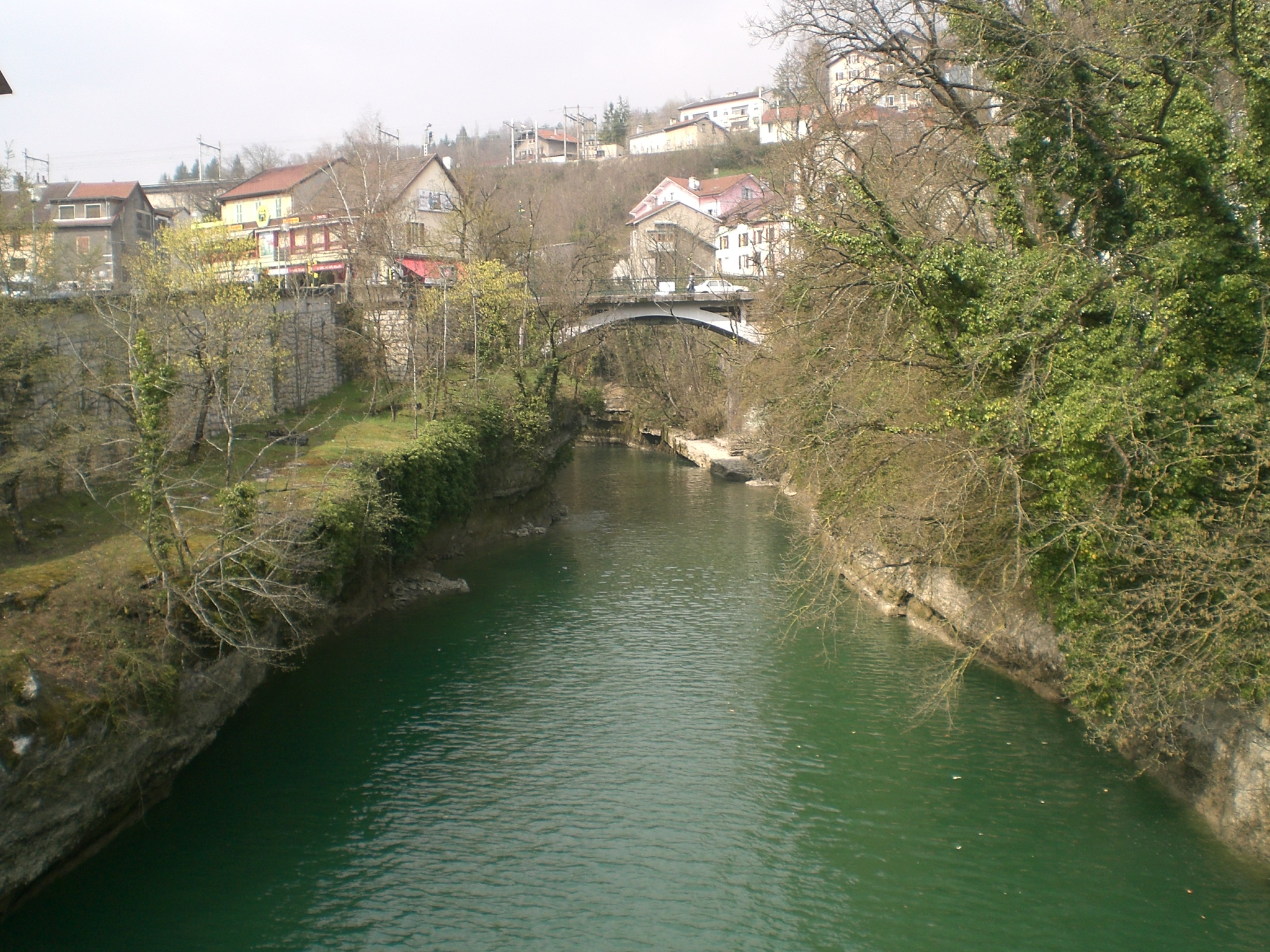 La Valserine à Bellegarde-sur-Valserine et le dernier pont routier avant confluence avec donc la rue Joseph Marion ou la D1206